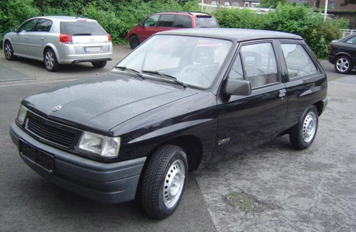 CORSA A